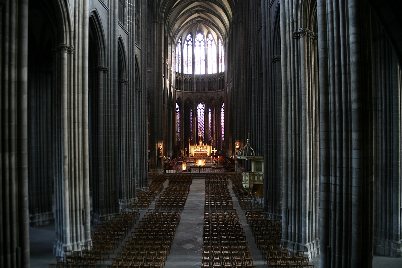 Nef de la Cathédrale Notre-Dame de l'Assomption, Clermont-Ferrand